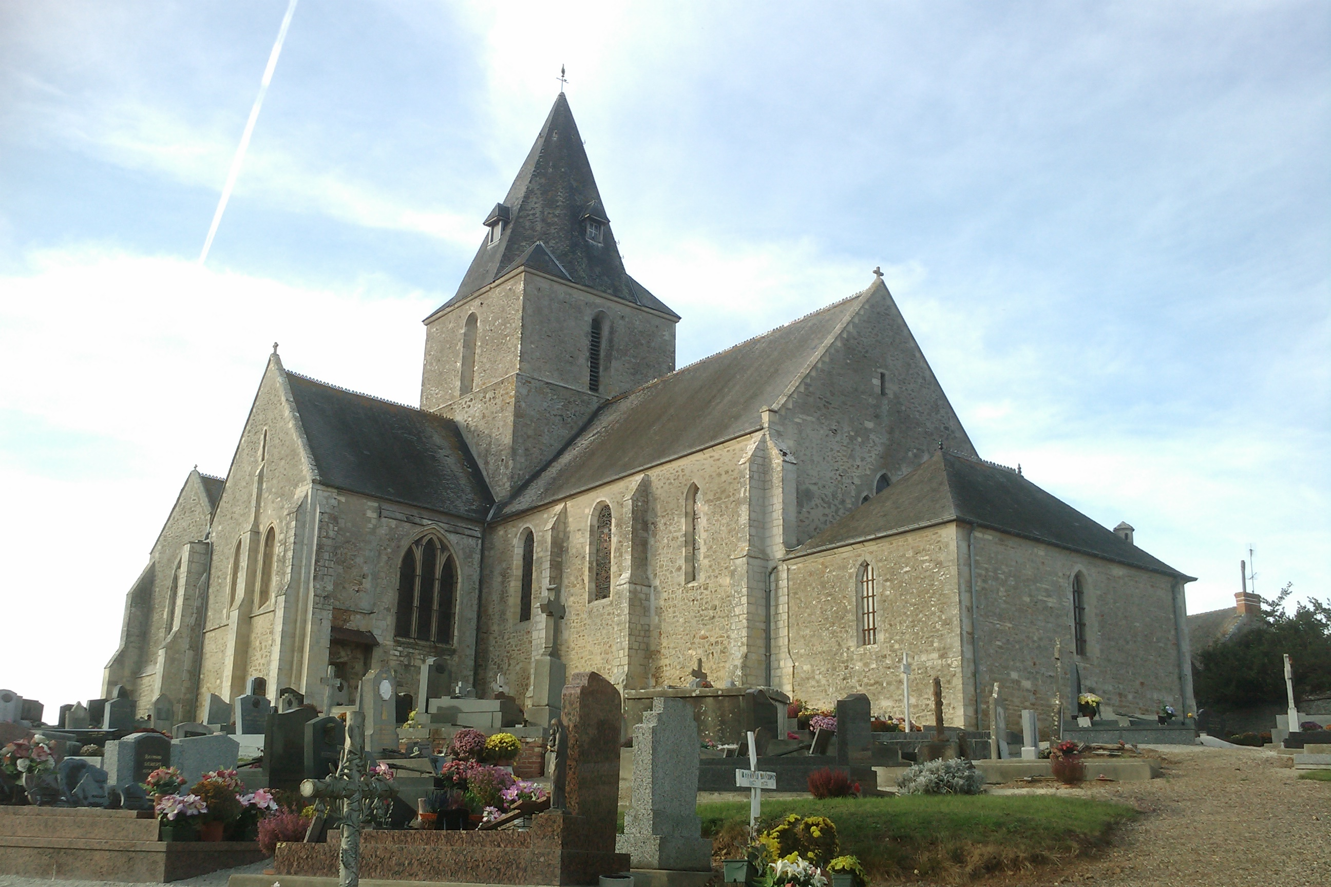 Église Saint-Martin de Montmartin-en-Graignes (édifice du 12e siècle)